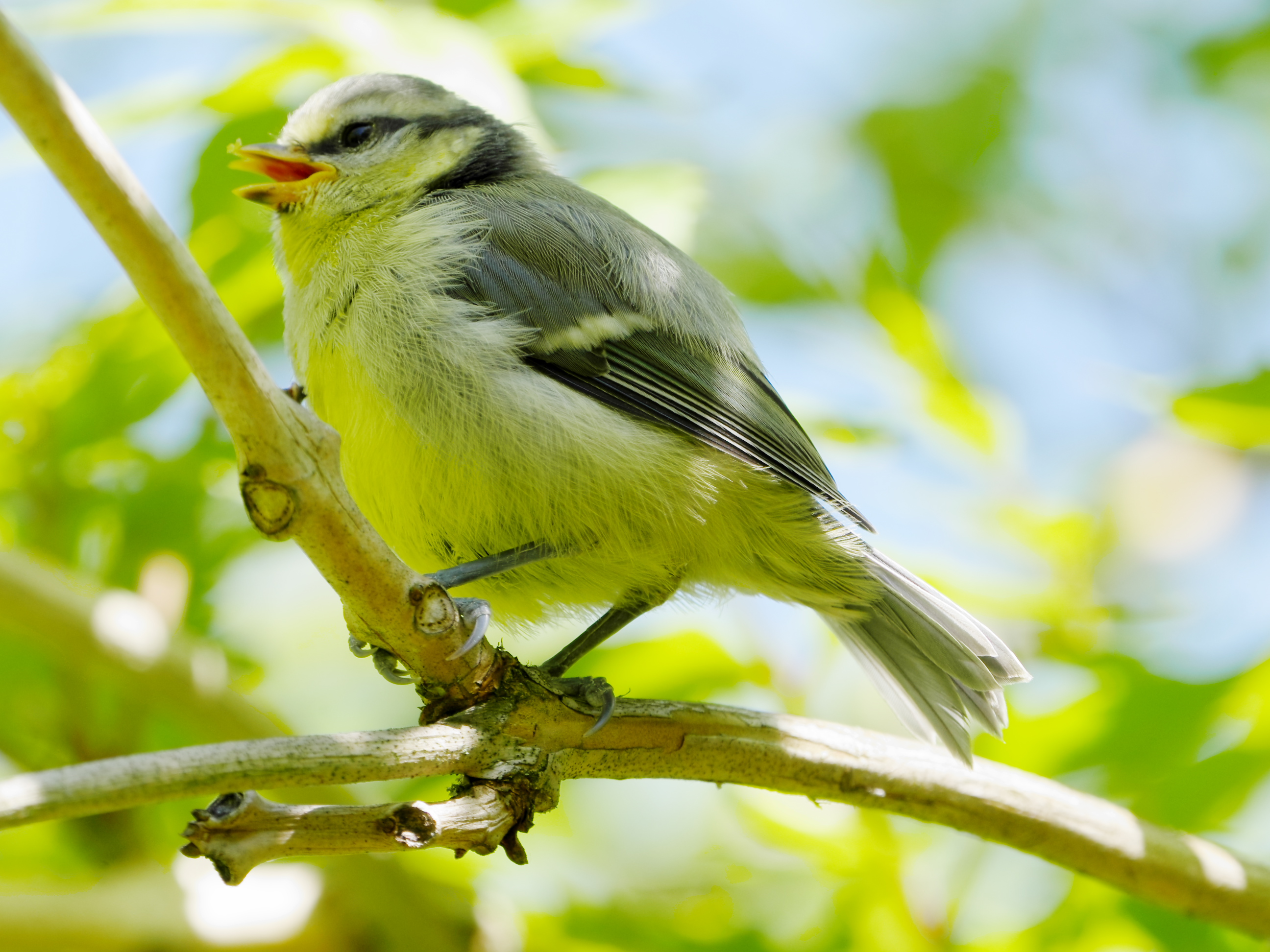 Blaumeise, Jungvogel, Nahaufnahme